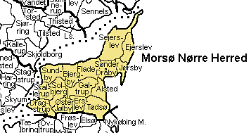 Morsø Nørre Herred, Thisted Amt Denmark Source: Map by Svend-Erik Christiansen